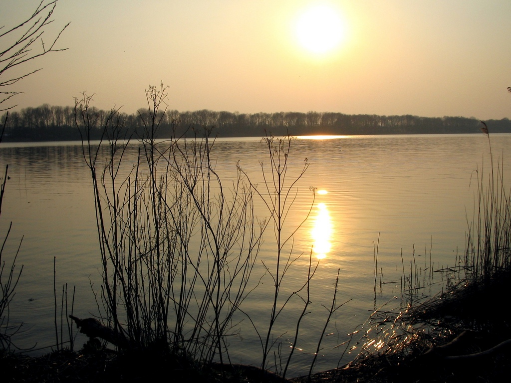 Maarsseveense plassen, Utrecht